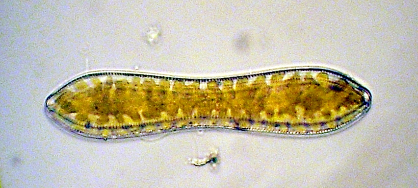 Cymatopleura solea, Teich im Wald des Furlbachtals, Juni 2009